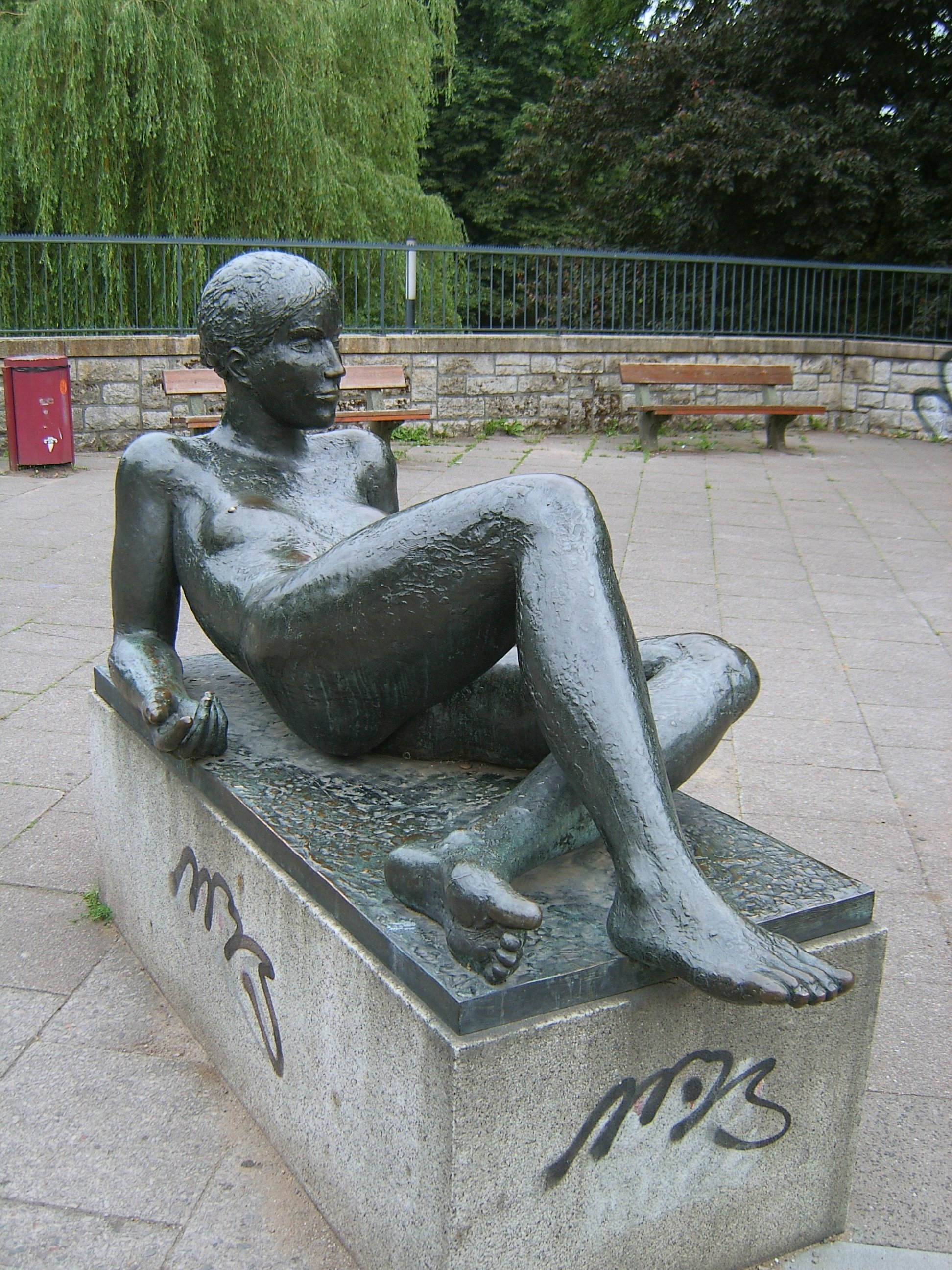 Bildbeschreibung: Die Liegende von Edgar Augustin (1977), Hamburg, Stephansplatz in der Hamburger Neustadt, Eingang zum Alten Botanischen Garten Fotograf: selbst Datum: 28.6.2006